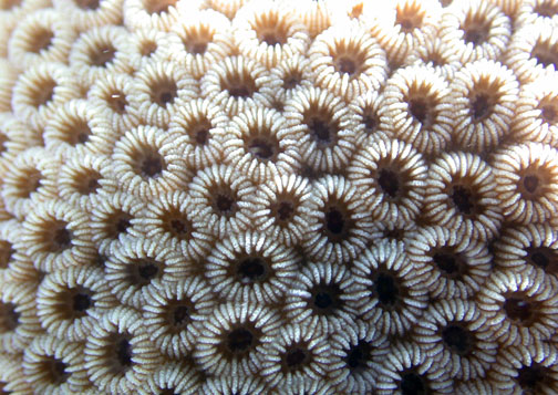 Montastraea curta en Samoa Americana